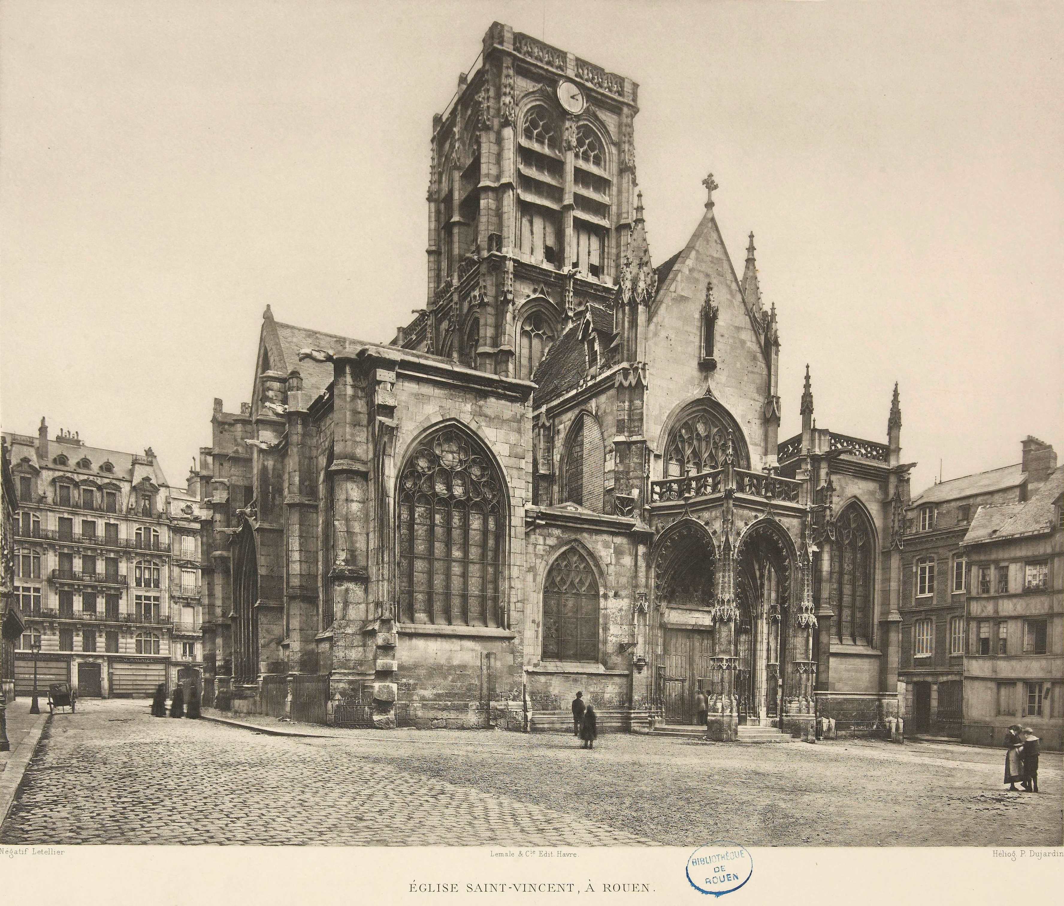 Ancienne église Saint-Vincent à Rouen, détruite en 1944. Photographie d'Émile-André Letellier. Reproduction en héliogravure par Paul Dujardin pour La Normandie monumentale et pittoresque, édifices publics, églises, châteaux, manoirs, etc.,,. Tome I, Seine-Inférieure, planche 23. Éditions Lemasle et Cie, Le Havre, 1893 - Image 24,9 x 31,5 cm.